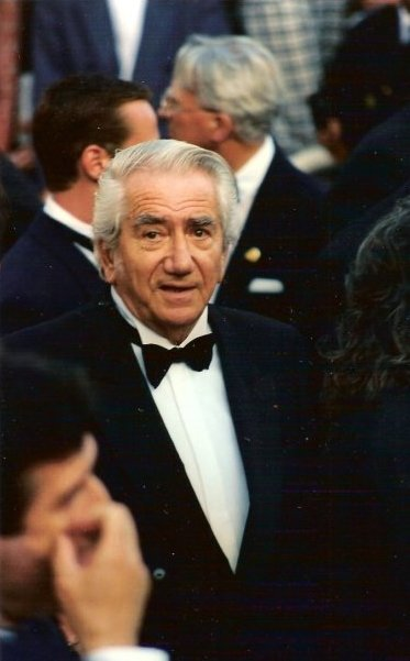 Daniel Gélin au festival de Cannes